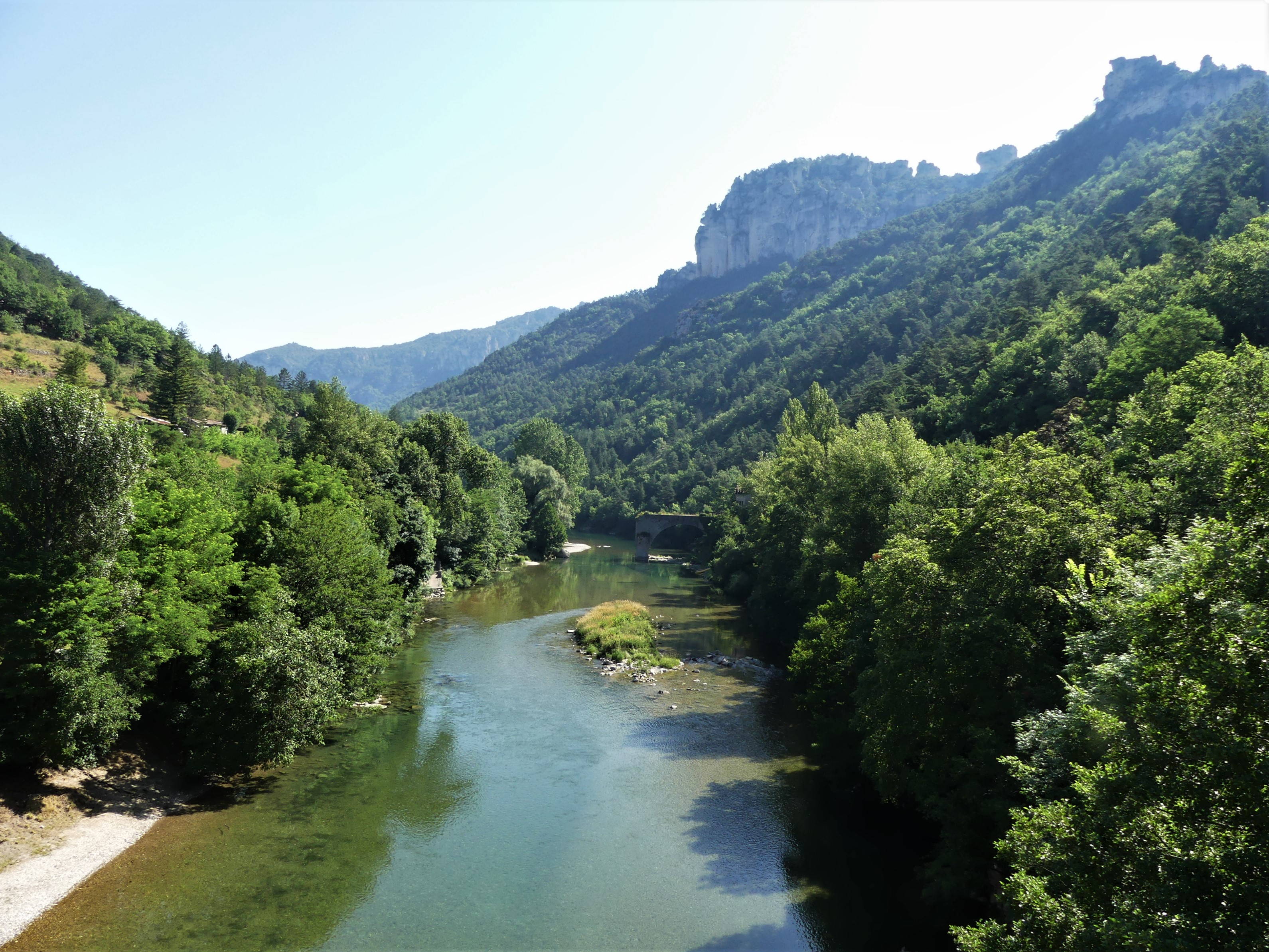 Le Tarn au pont de la route départementale 996, en limite de Mostuéjouls (à gauche, département de l'Aveyron) et Le Rozier (en rive opposée, département de la Lozère), France. Vue prise en direction de l'amont.